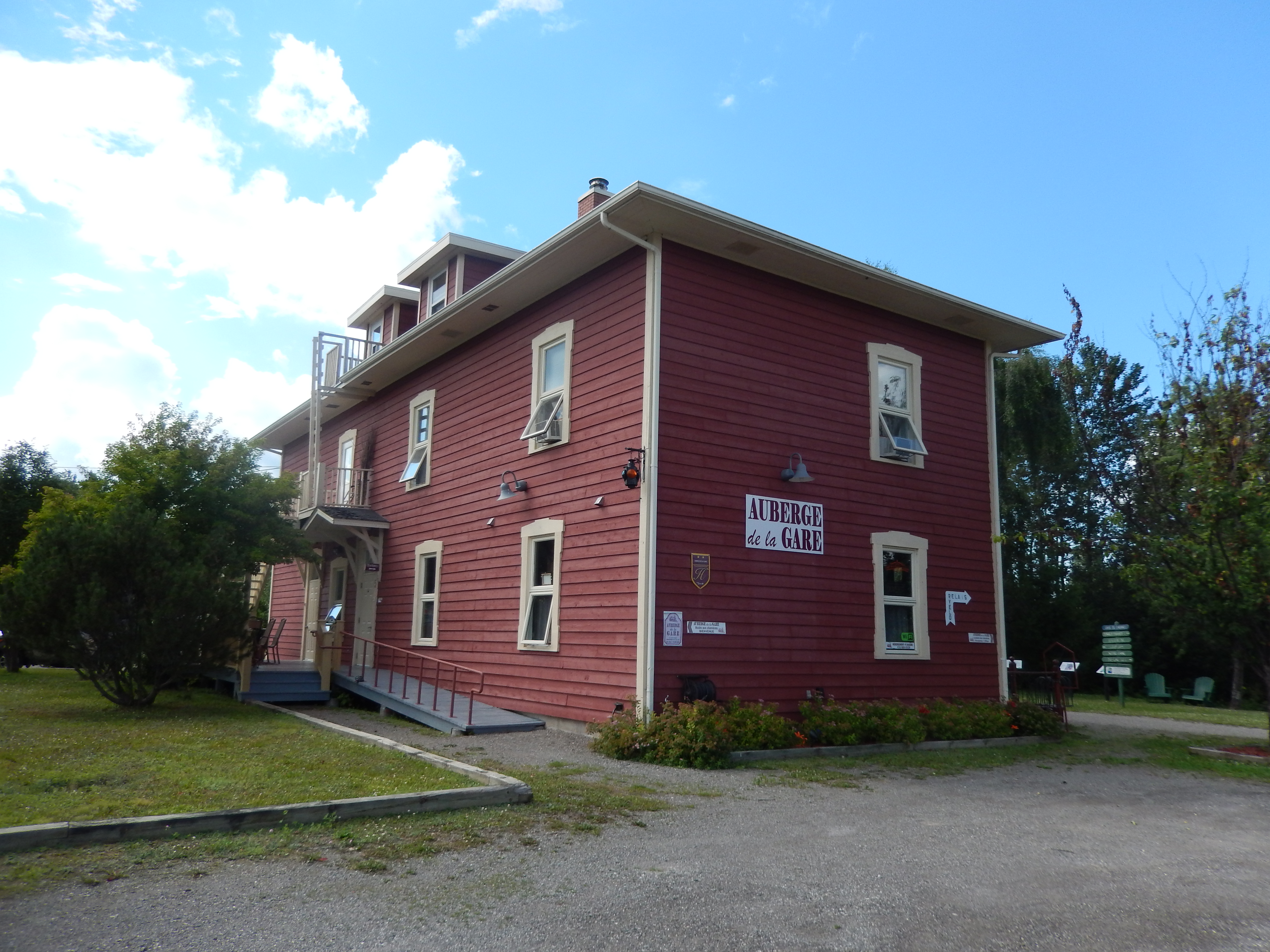 Gare de Cabano en juilet 2016.